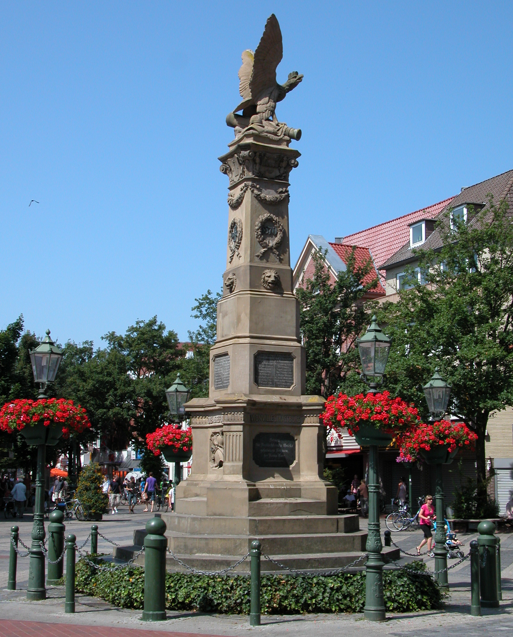 Leer: Kriegerdenkmal in der Innenstadt.